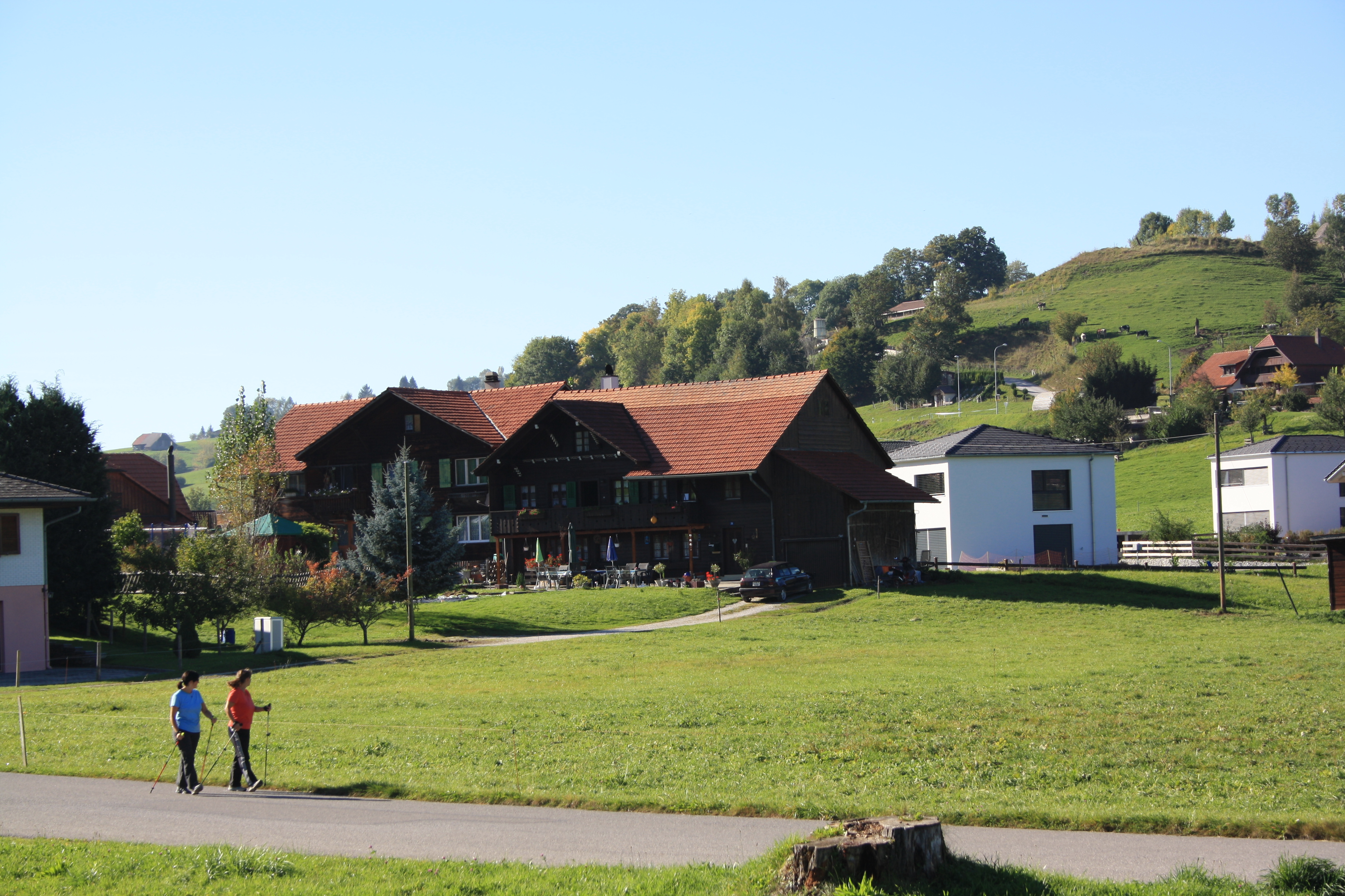 Holzhaus in Oberschrot